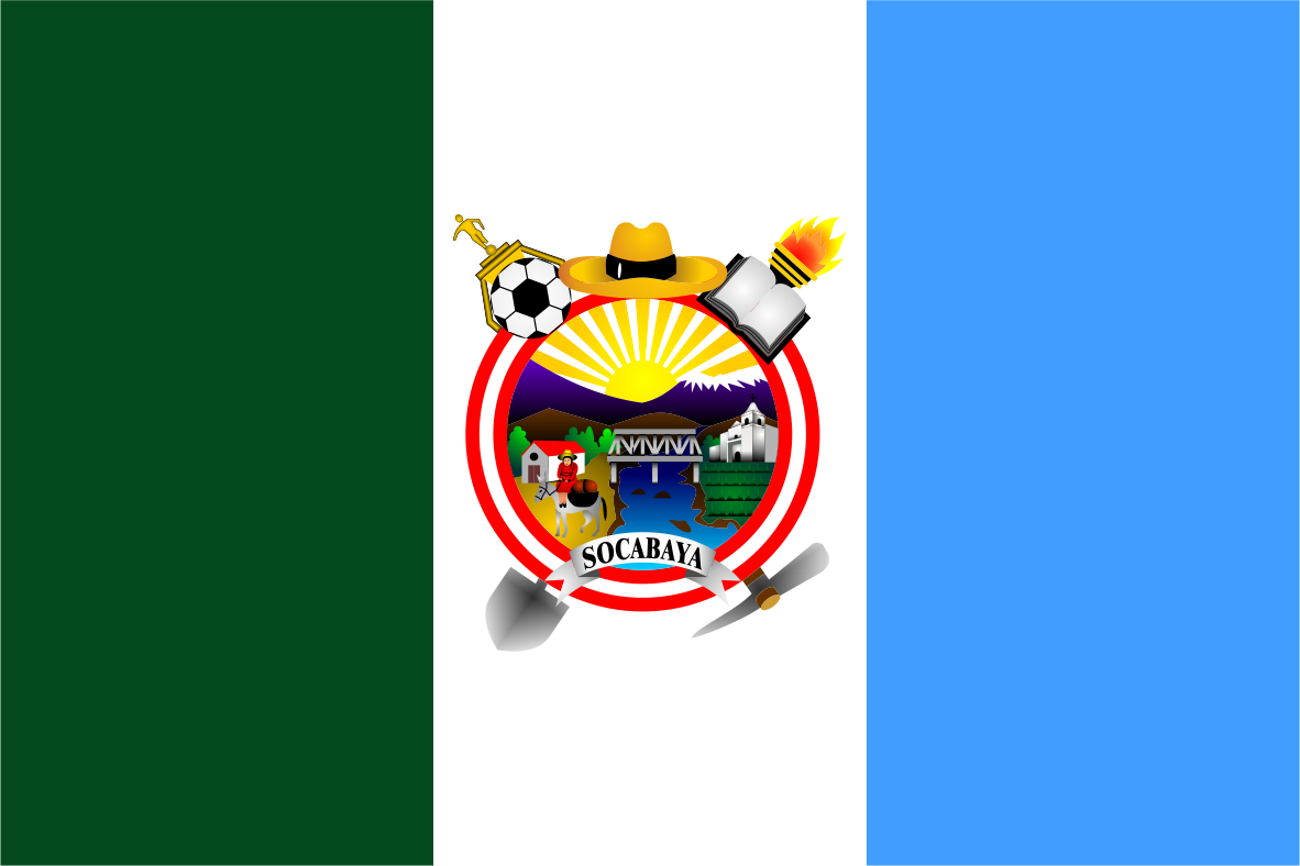 Distrito de Socabaya